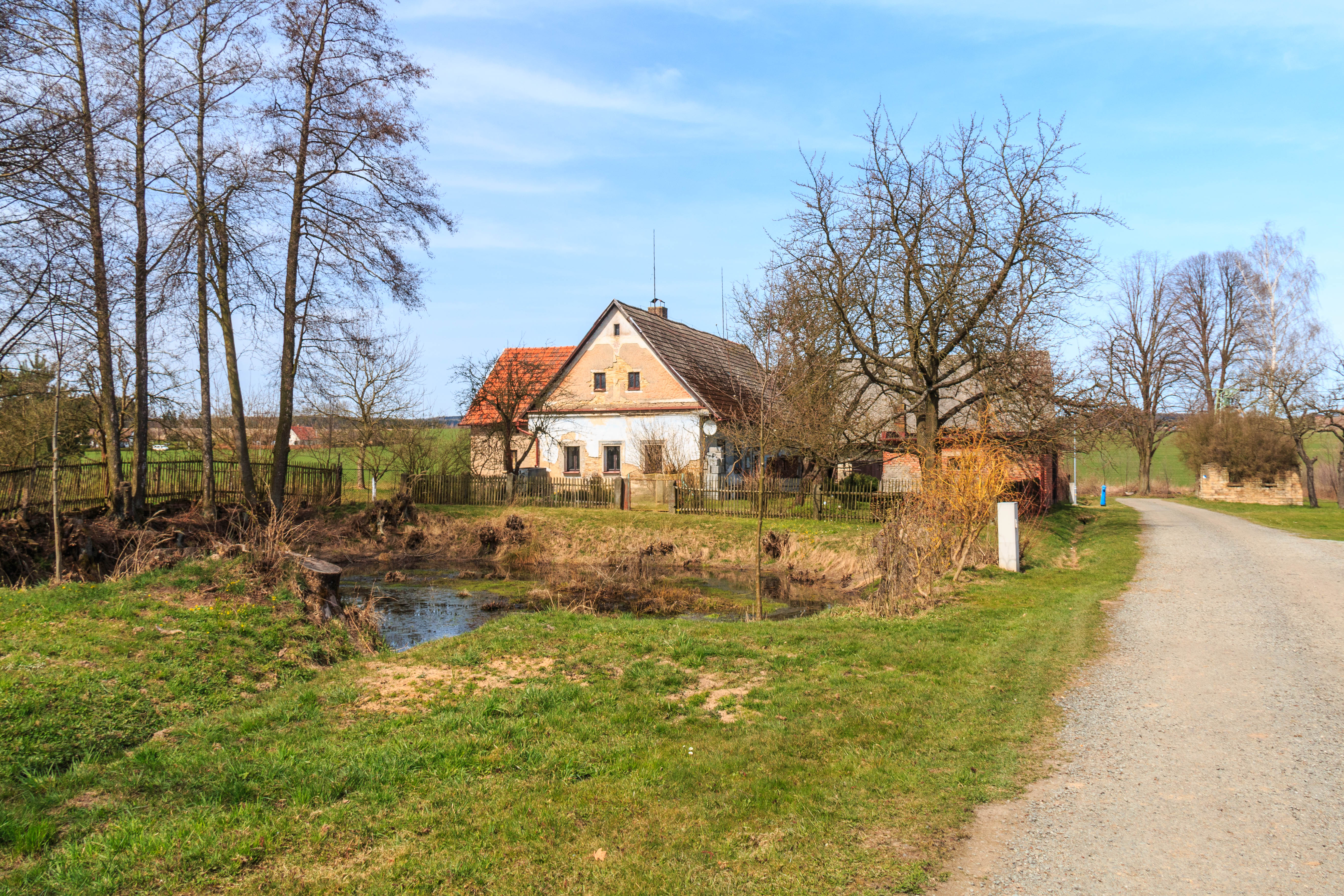 Nový Dvůr čp. 9